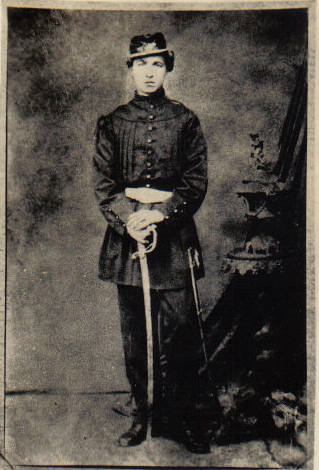 Pinheiro Machado aos quinze anos de idade com o uniforme do Corpo de Voluntários da Patría, na Guerra do Paraguai